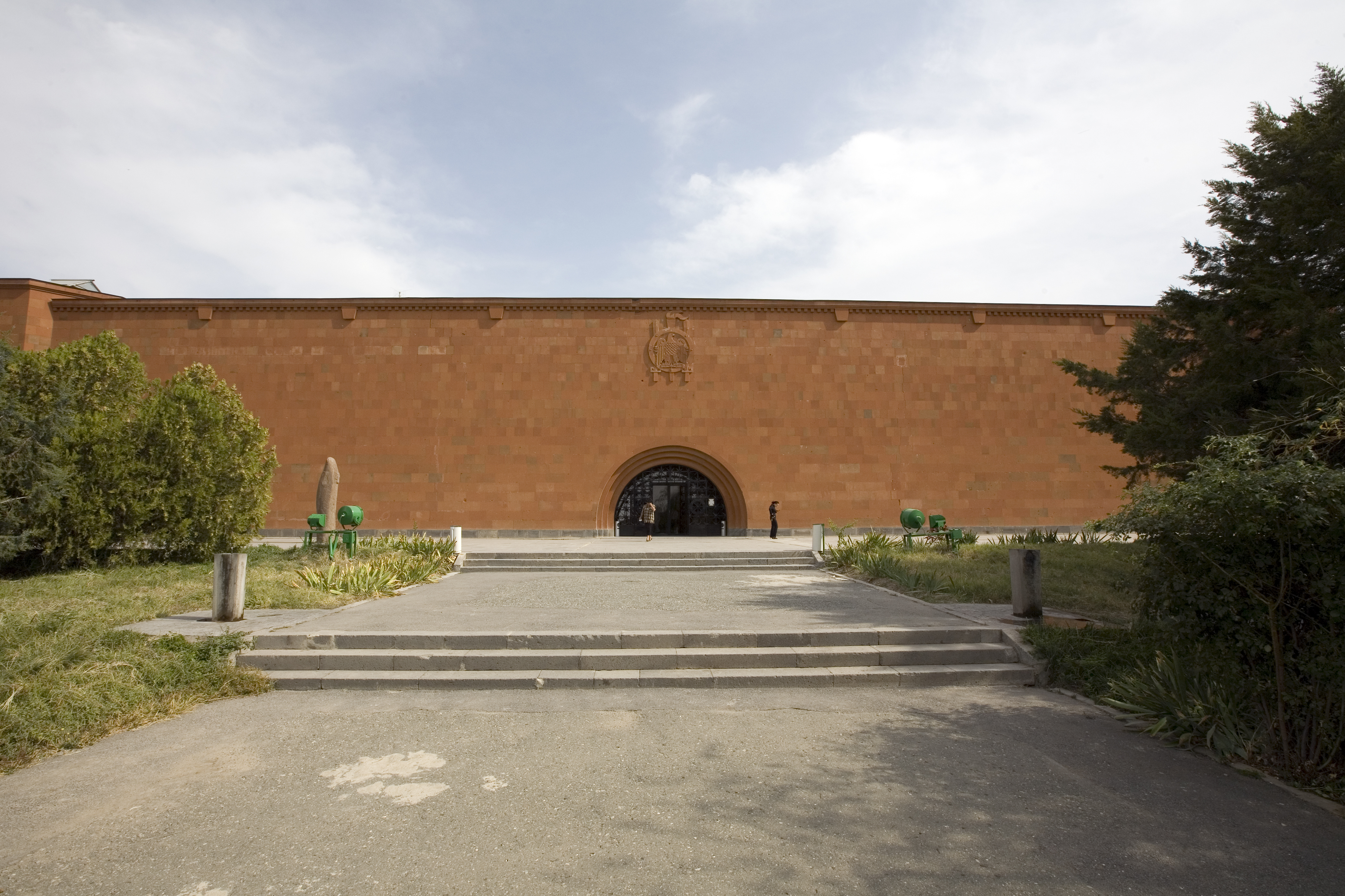 Sardarapat Museum